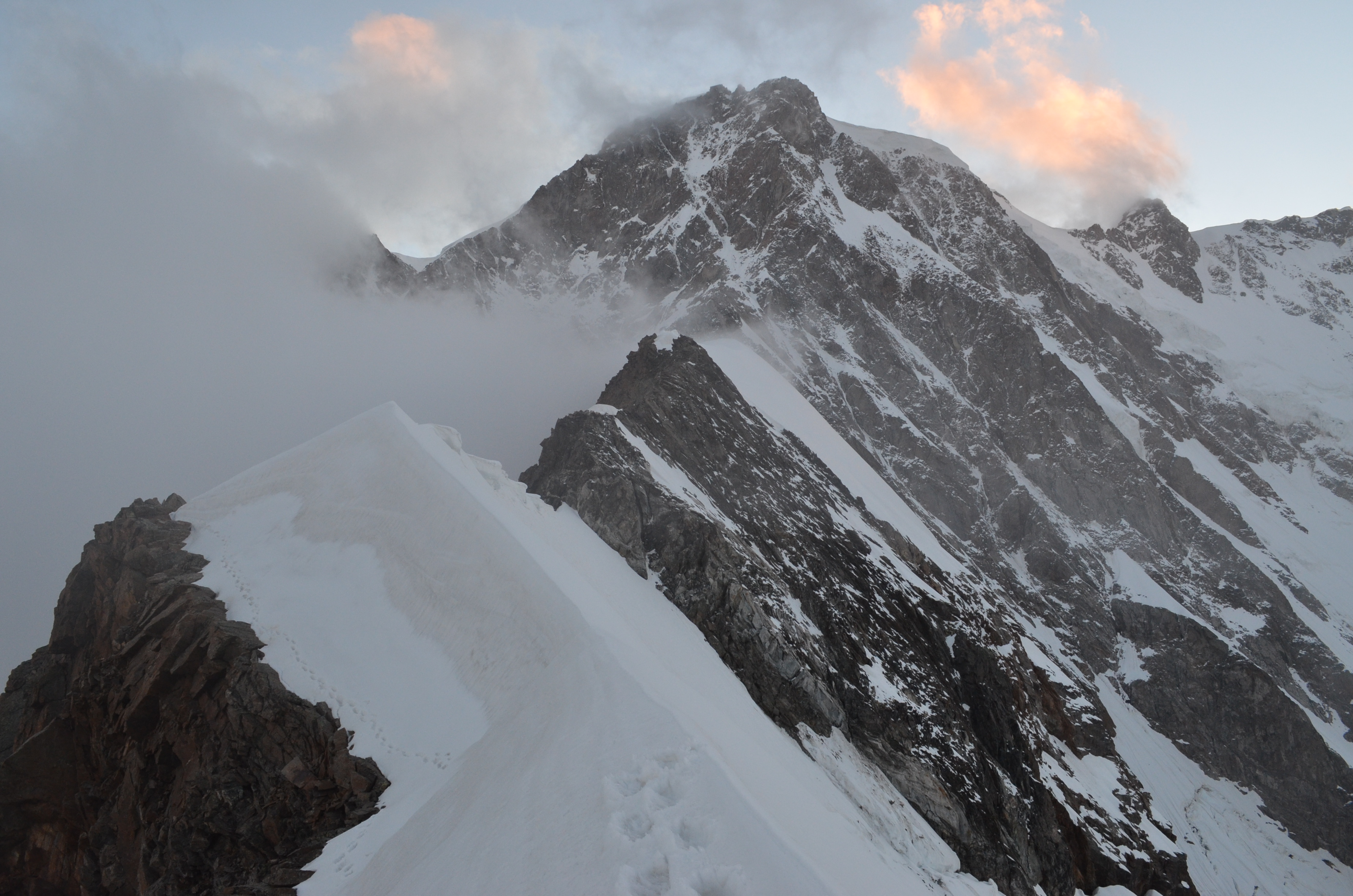 tratto iniziale della Cresta Signal This is a photo of a monument which is part of cultural heritage of Italy.